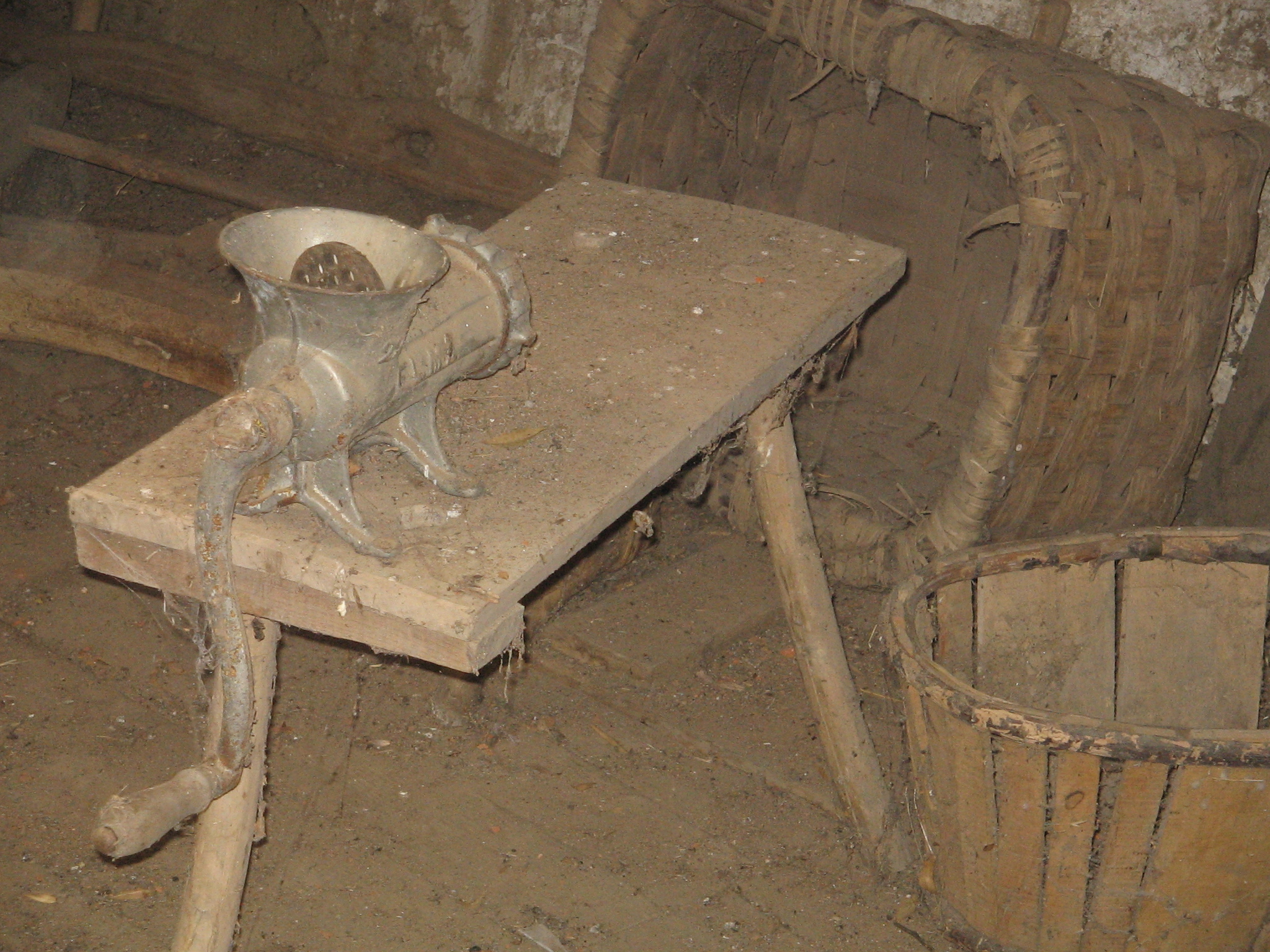 Molino manual para picar carne y elaborar chorizo.